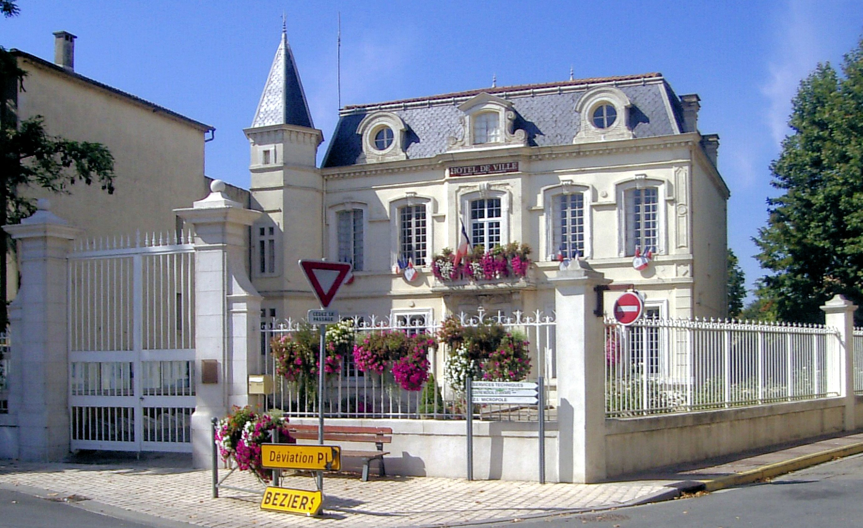 L'hôtel de ville de Cuxac-d'Aude